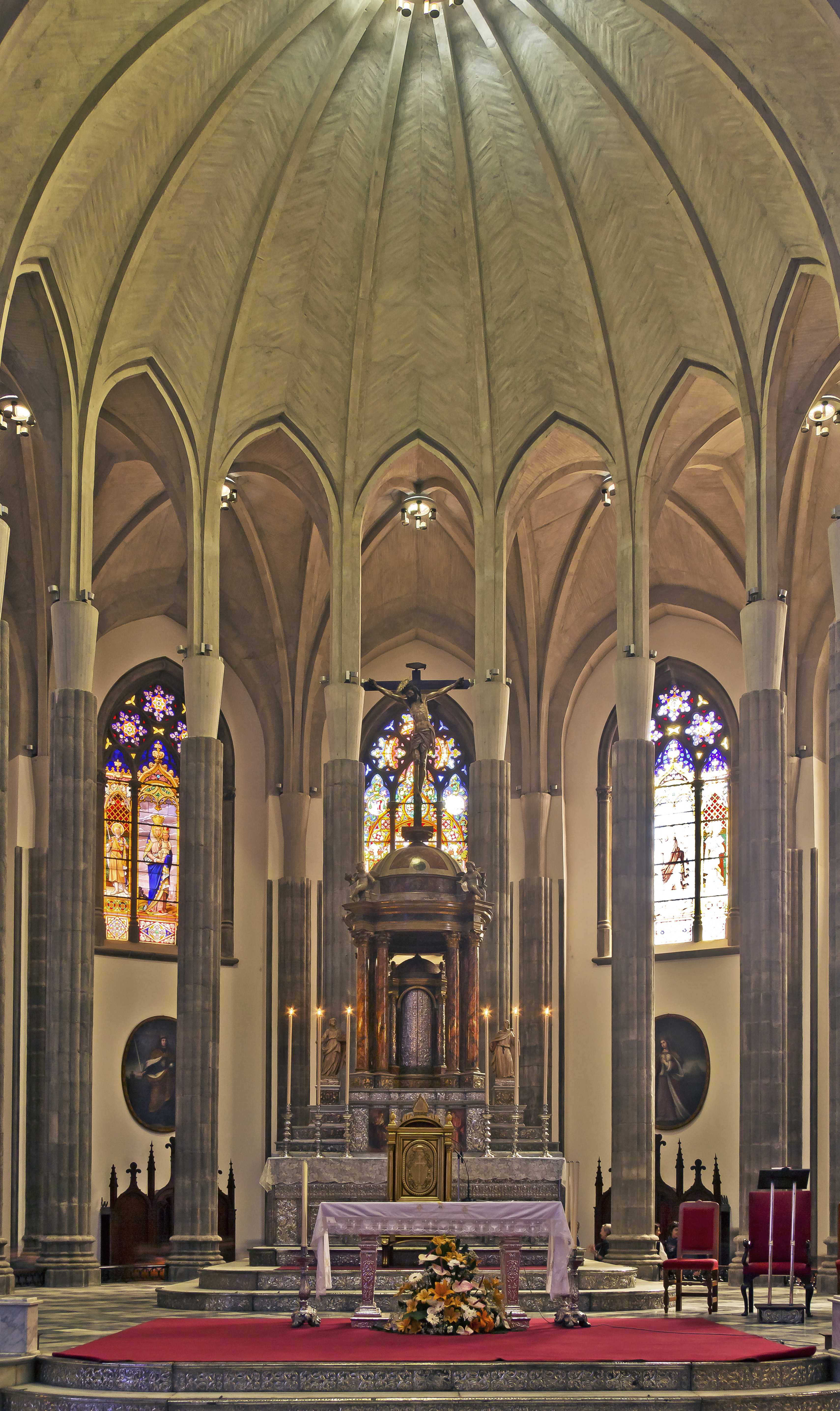 Blick in den Hauptaltarraum der Kathedrale von La Laguna nach der Renovierung 2014